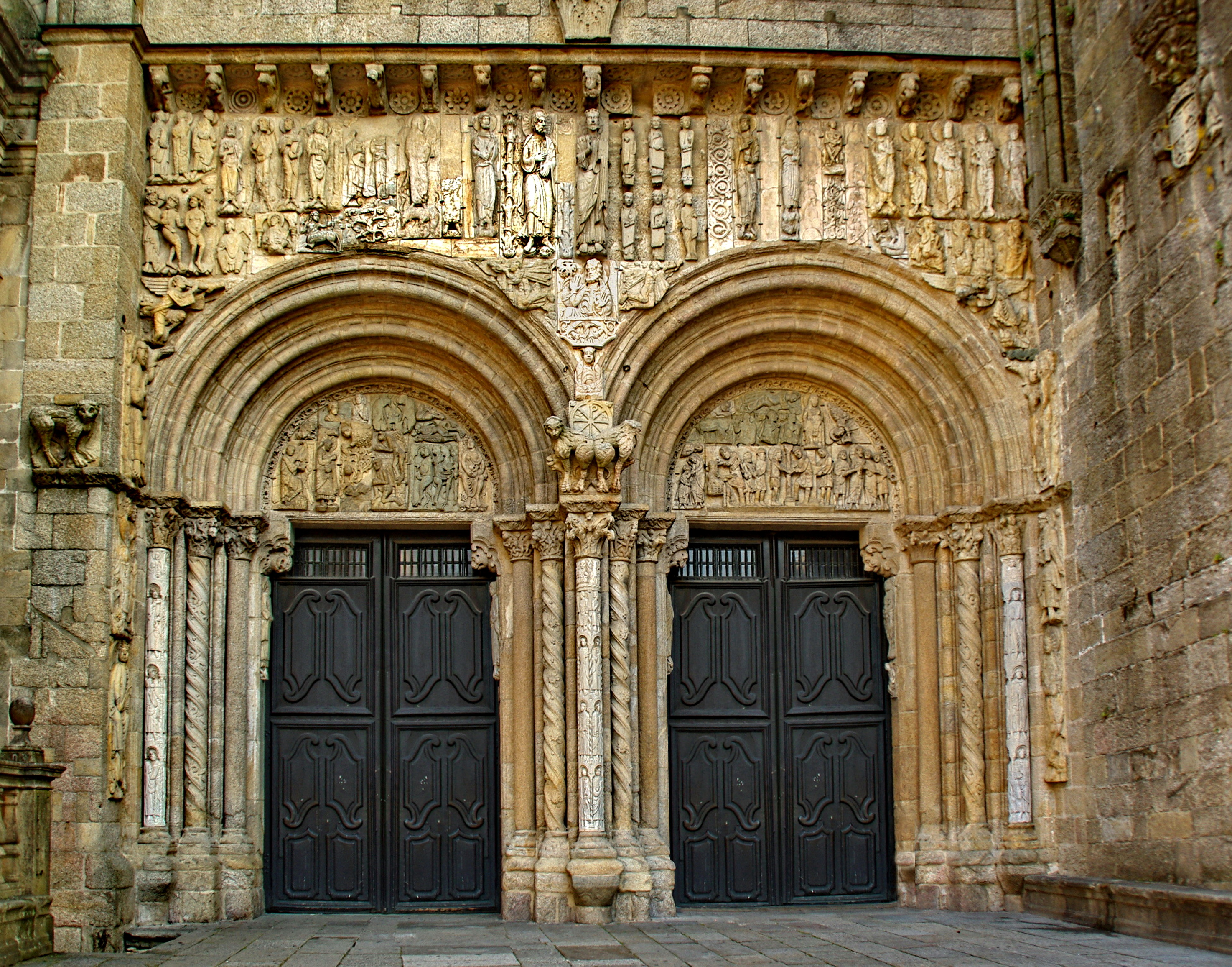 Façana de les Platerías a la catedral de Santiago de Compostela. Romànica (1103-1117)